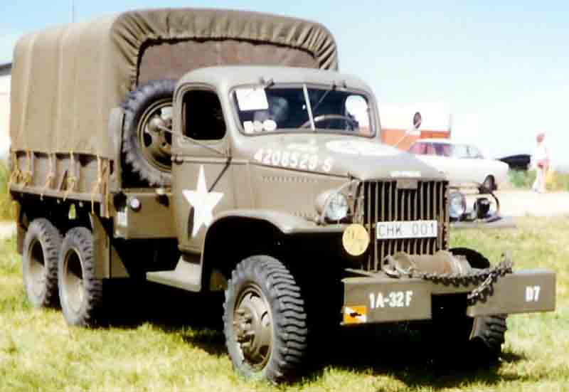 GMC CCKW Truck 1943